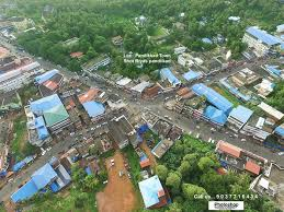 View of Pandikkad Town